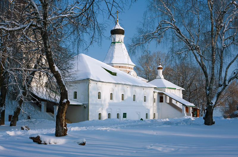 Церковь Покрова Пресвятой Богородицы (Владимирская область, Александров, Музейный проезд, 20)